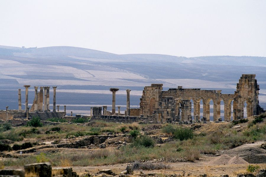 Volubilis